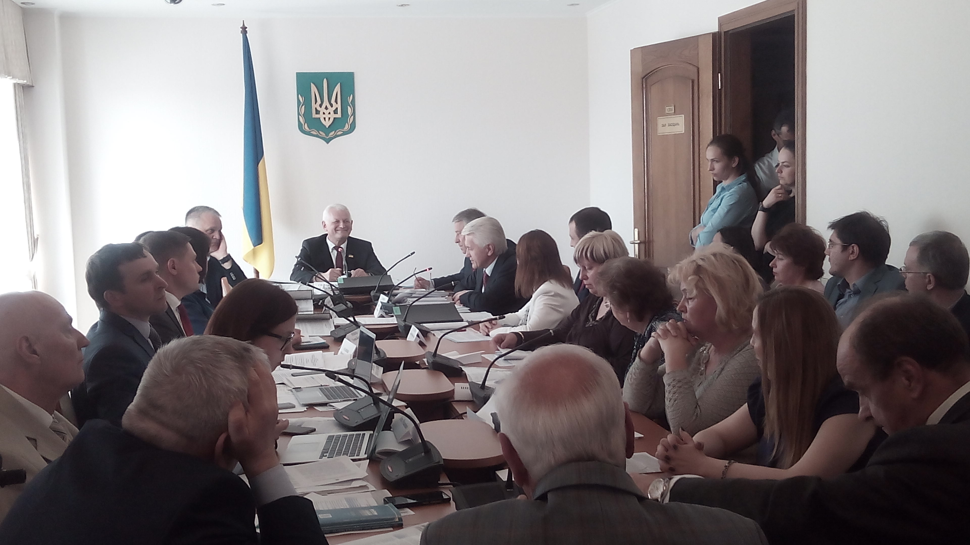 Засідання Комітету з питань освіти й науки Верховної Ради України. Головує в.о. голови Комітету Олександр Співаковський. Ліворуч від нього - депутат Олексій Скрипник. Праворуч - депутати Іван Кириленко, Володимир Литвин, Тарас Кремінь, Ірина Суслова. У правому нижньому кутку - заступник Міністра освіти та науки Володимир Ковтунець.